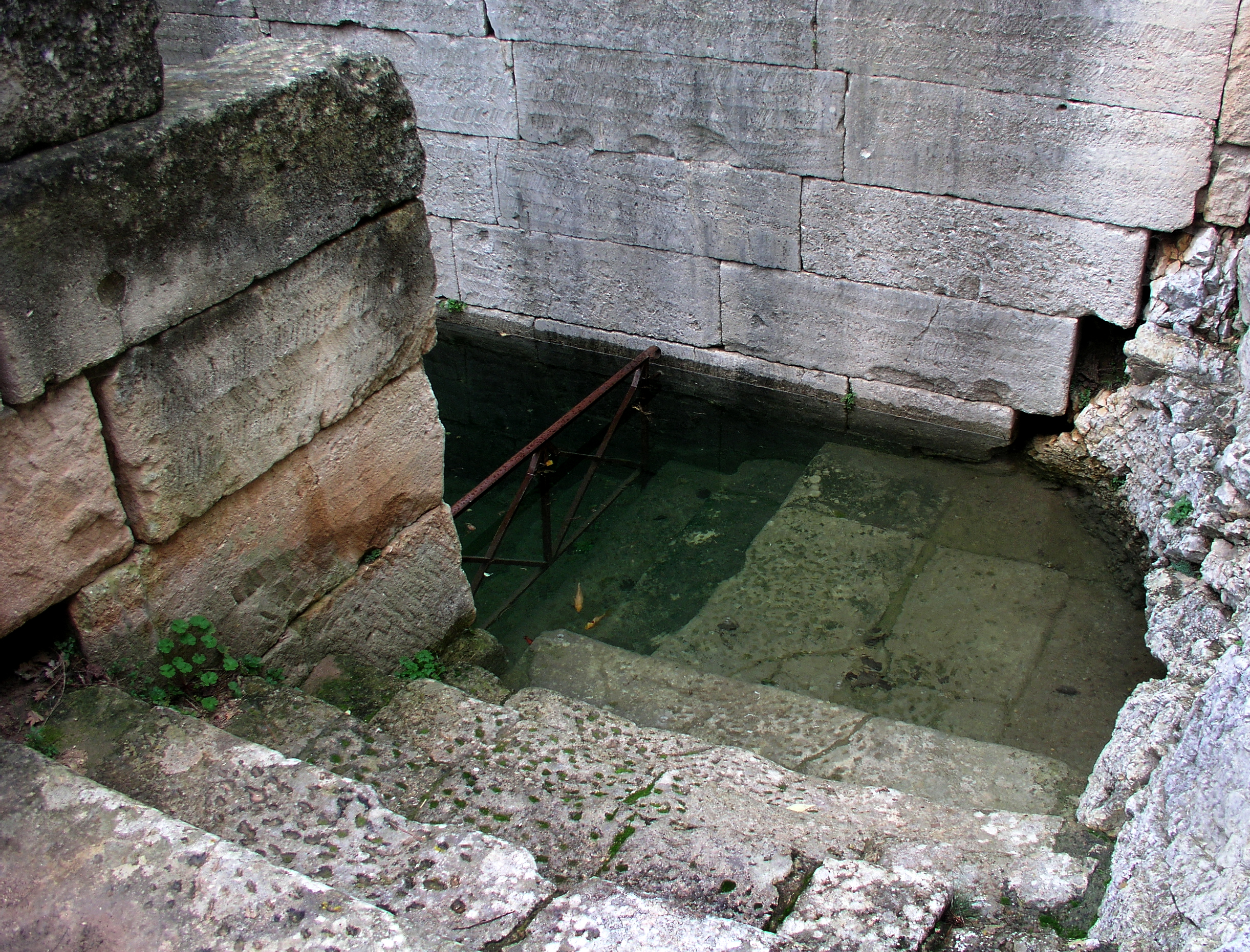 Fontaine sacrée de Glanum